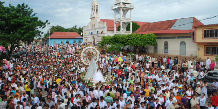 Virgen del Socorro en la solemne procesion, del 8 de Septiembre.